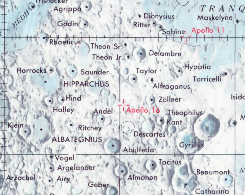 Localización del lugar de aterrizaje del Apolo 16. (Lunar Chart LPC1. Second Edition)